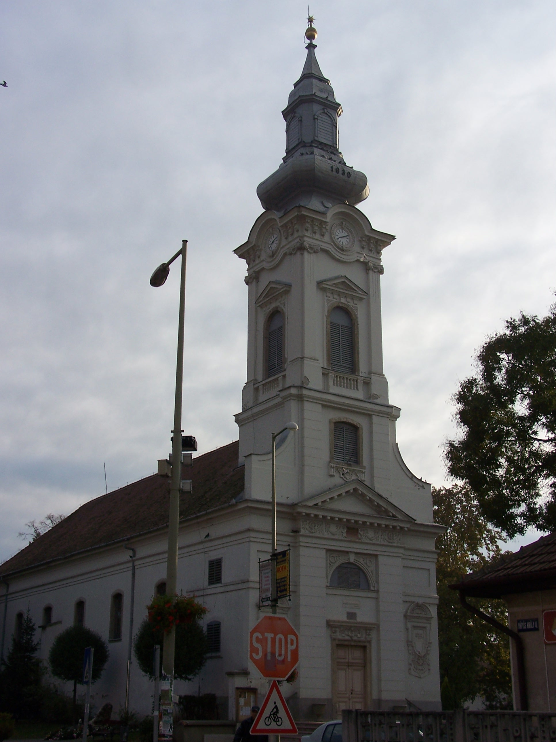 Református templom (Monor, Kossuth u.) This is a photo of a monument in Hungary. Identifier: 7130